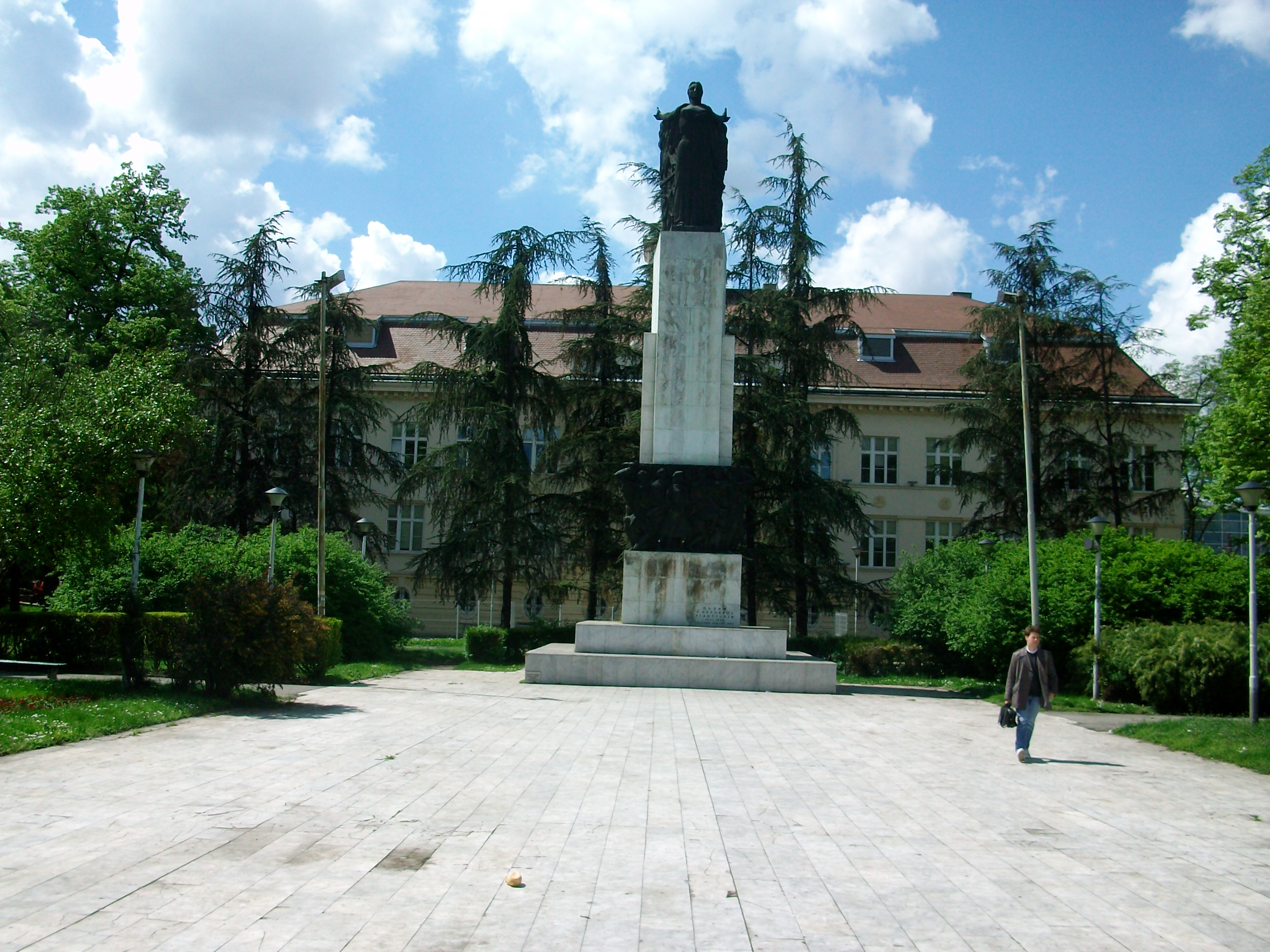 Авијатичарски трг